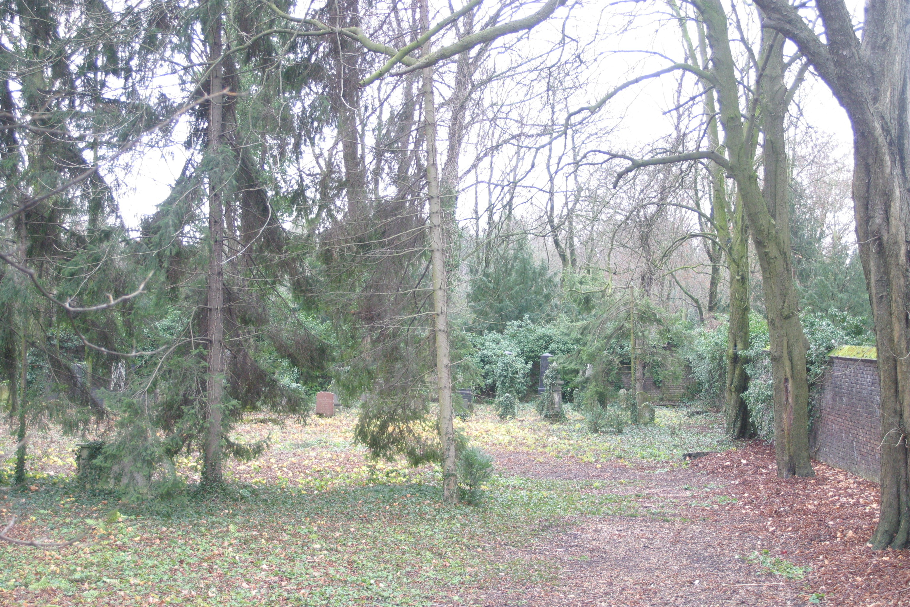 Jüdischer Friedhof am Melatengürtel: Der Jüdische Friedhof ist eigentlich ein Teil des Melatenfriedhofs, ist aber für die Öffentlichkeit nicht zugänglich, Der Eingang liegt am Melatengürtel neben dem Gerichtsmedizinischen InstitutThis is a photograph of an architectural monument.